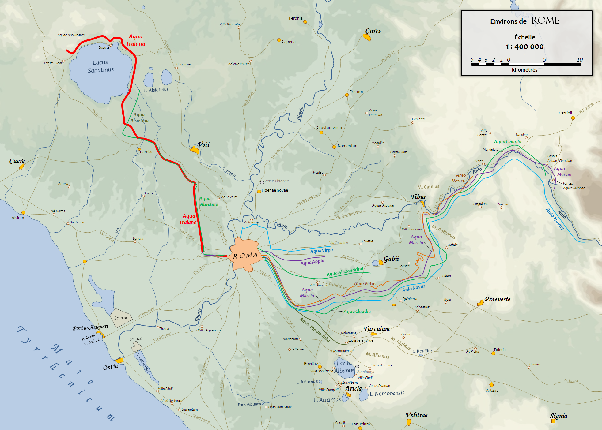 Carte du Latium antique sur lequel figure le tracé des aqueducs de Rome. D'après un fond de carte de 1886 (G. Droysens Allgemeiner Historischer Handatlas).